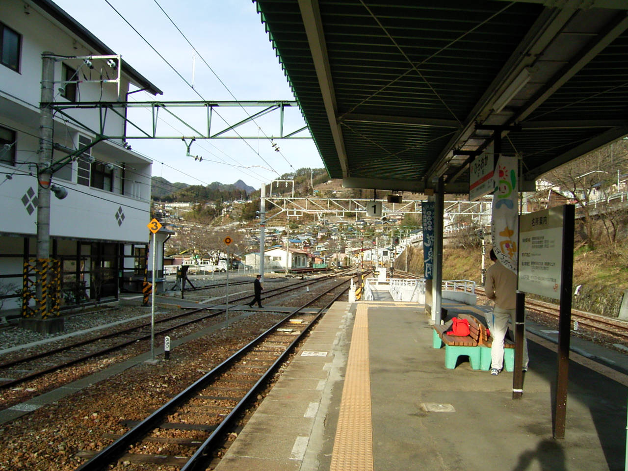 飯田線平岡駅ホーム